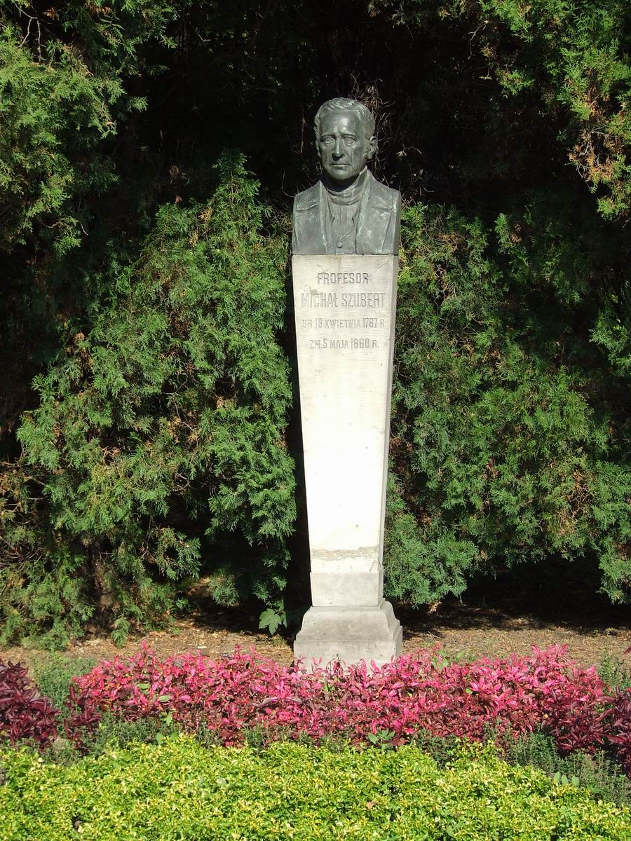 Michał Szubert, popiersie, Ogród Botaniczny UW w Warszawie